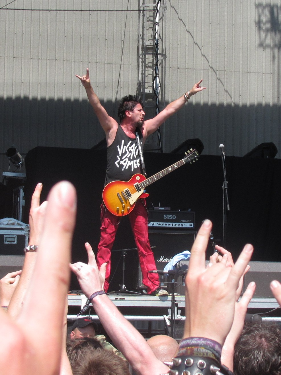 Michal Pixa, Visací zámek, Ronnie James Dio stage, Masters of Rock 2010